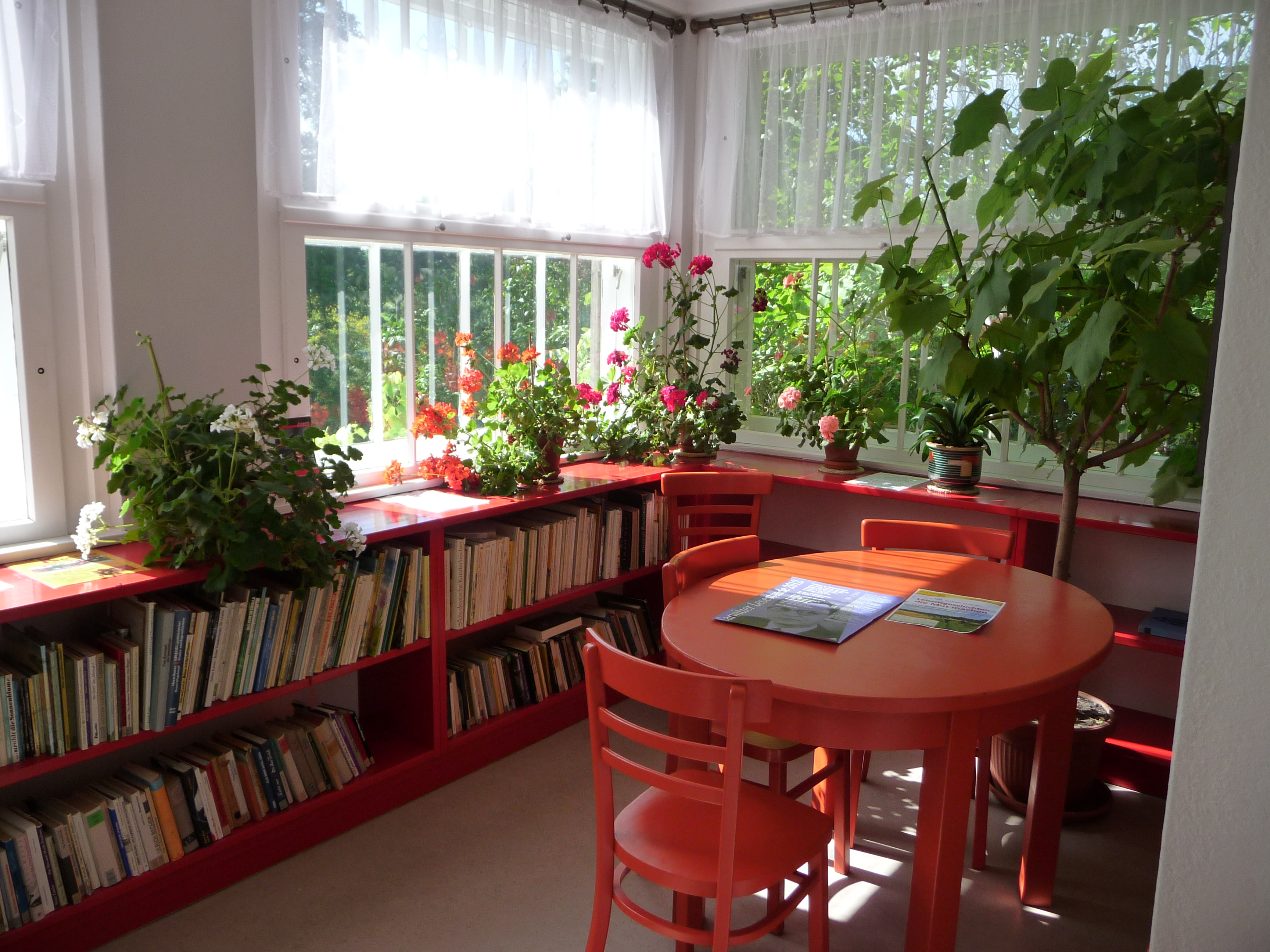 Veranda im Falladahaus